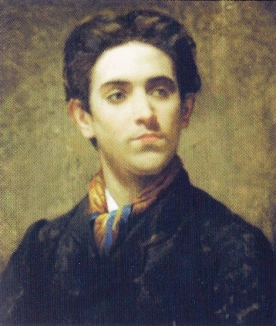 Retrato del ceramista Daniel Zuloaga, realizado por Ignacio Suárez Llanos